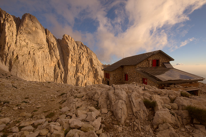 Il rifugio Franchetti (Gran Sasso) visto da dietro all'alba.